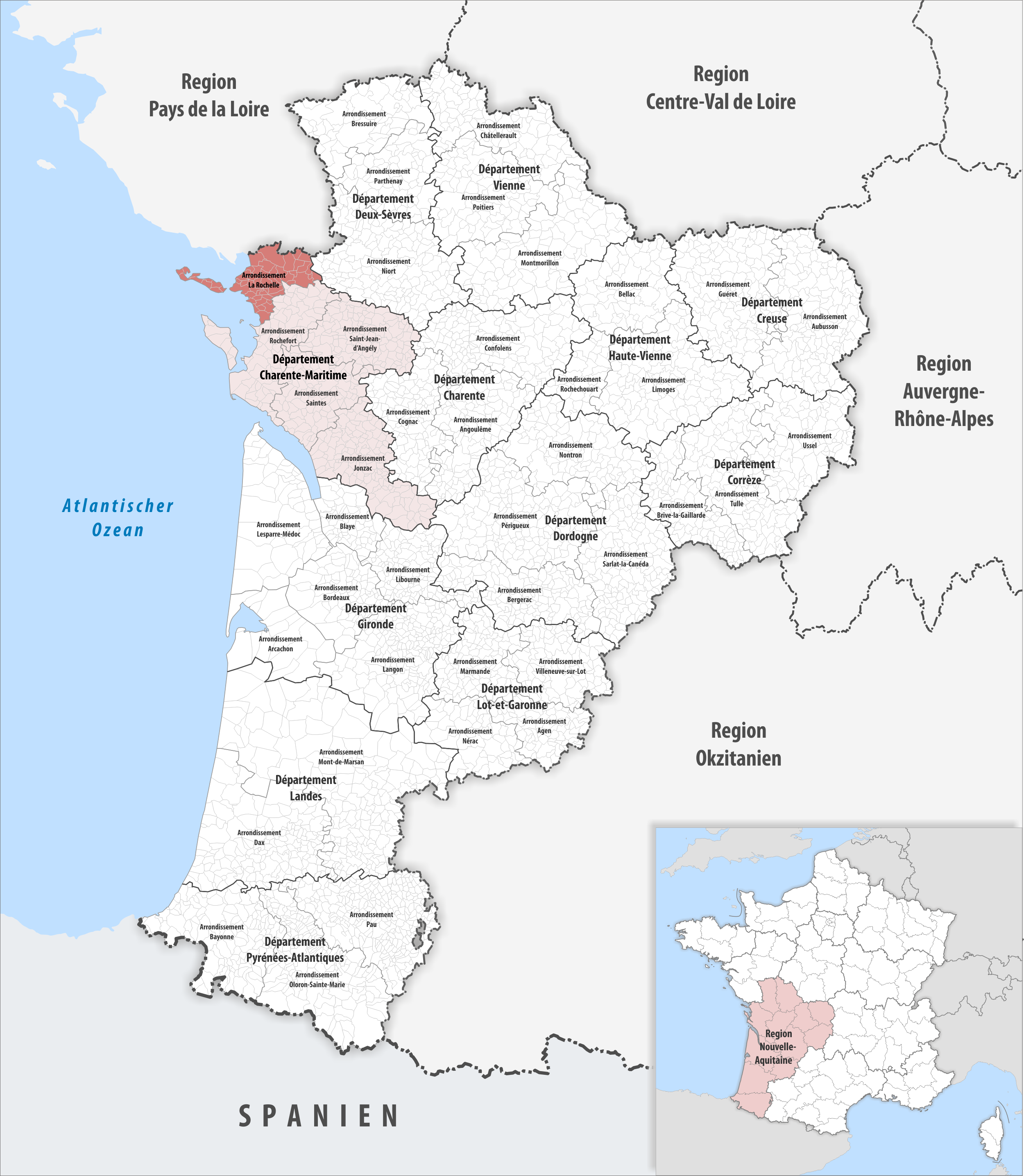 Lage des Arrondissements La Rochelle